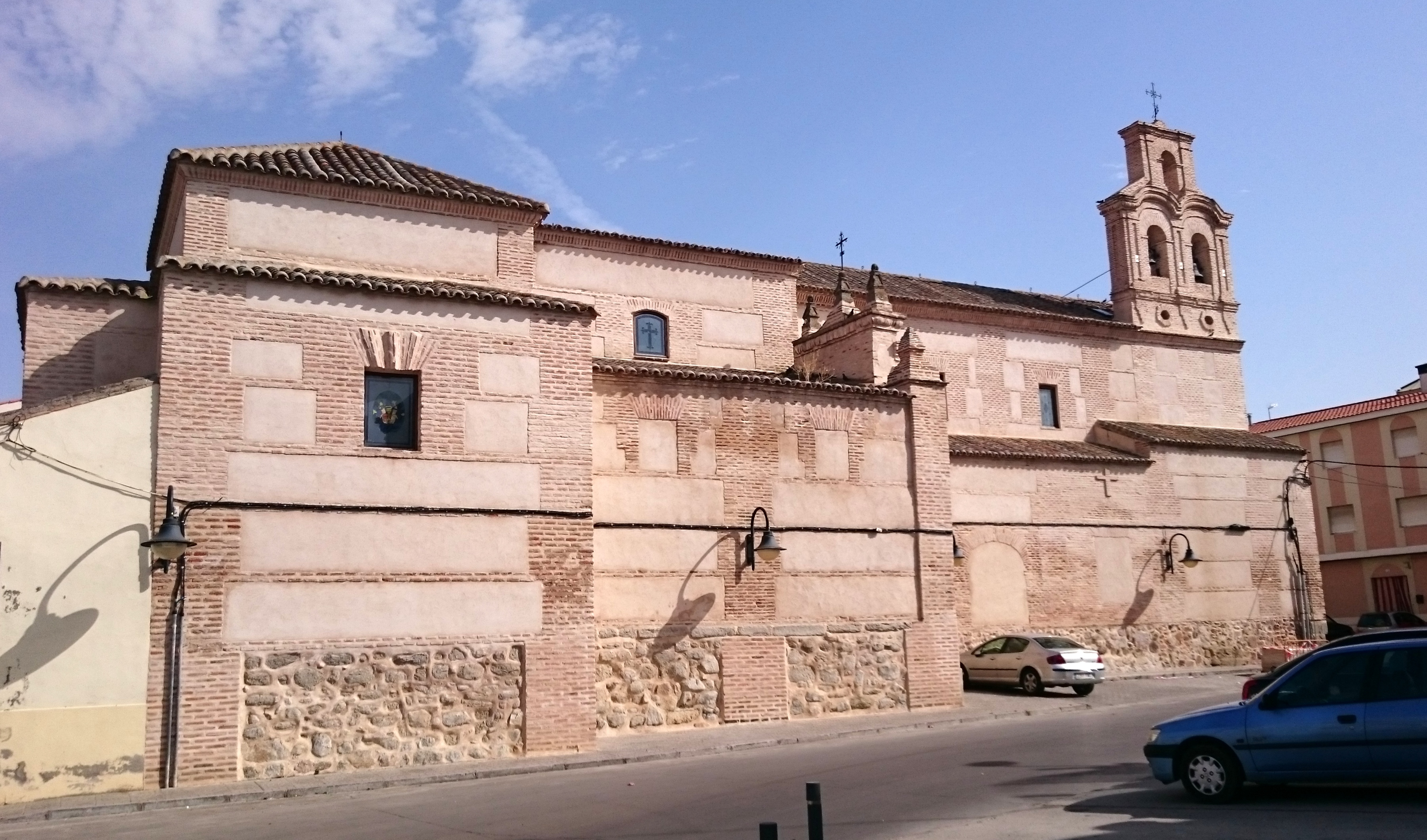 Convento de San Eugenio, en Mora (Toledo)